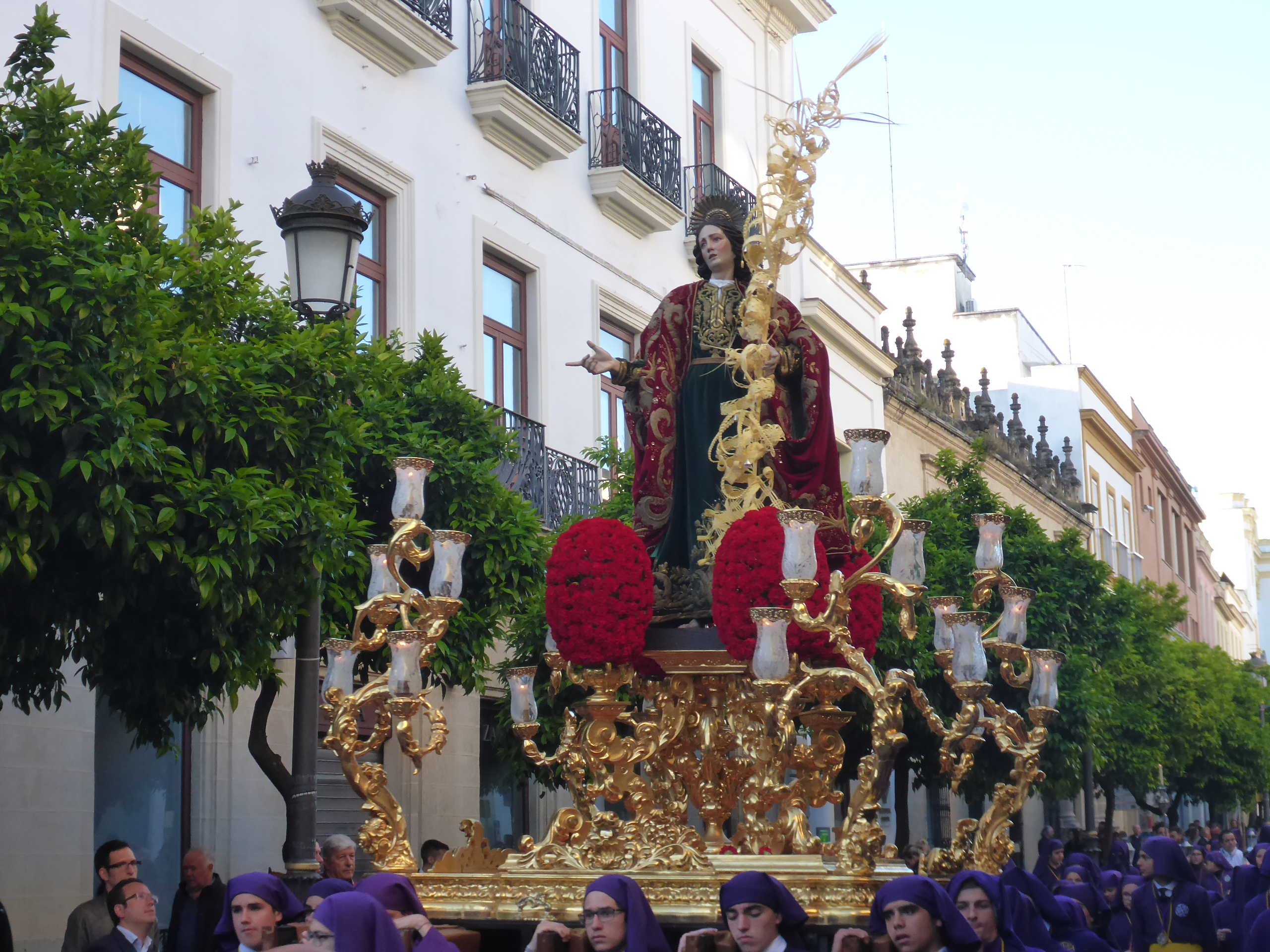 Hermandad Nuestro Padre Jesús Nazareno (Jerez)